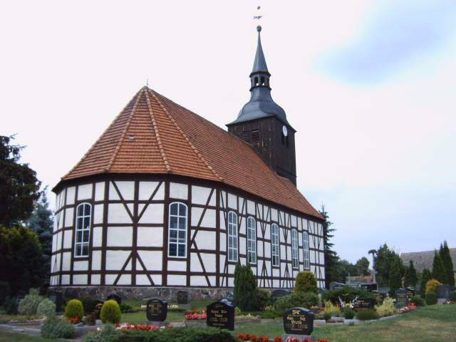 Dorfkirche in Schlepzig, Land Brandenburg, Deutschland Bild aufgenommen am 28.6.2006 durch Olaf Meister